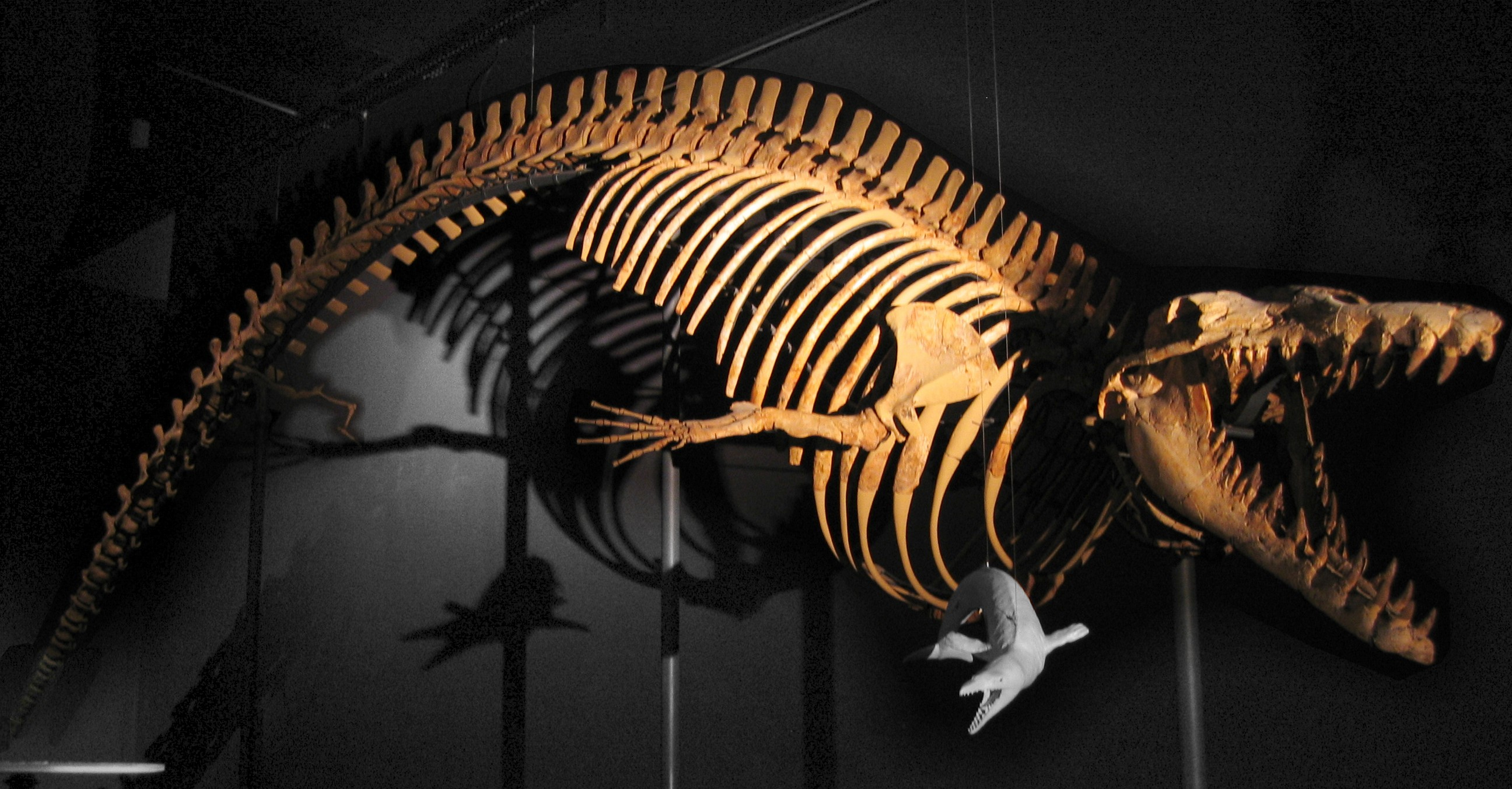 Cynthiacetus, le squelette